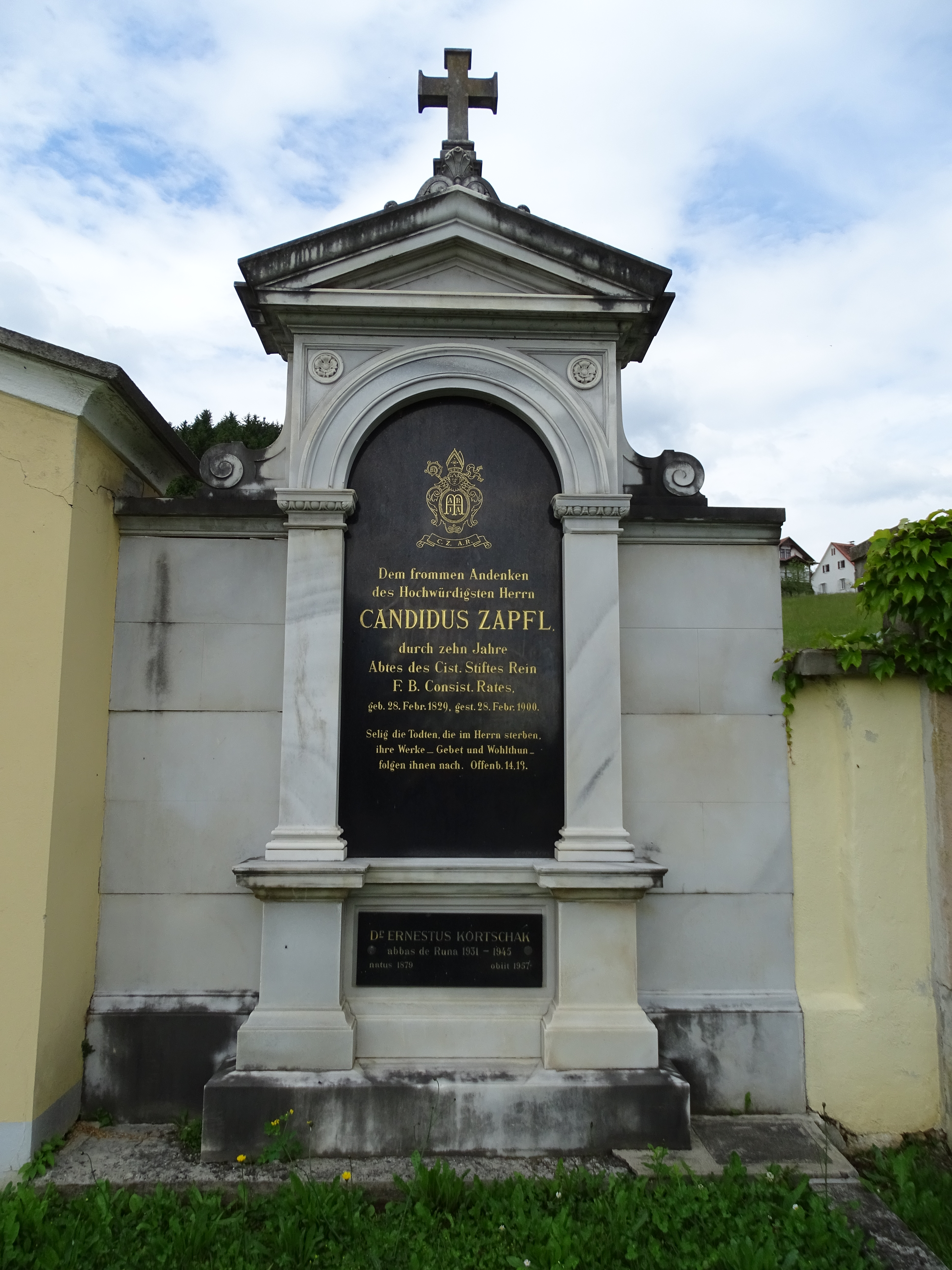 Die Abt- und Patresgräber am Friedhof Stift Rein-Eisbach